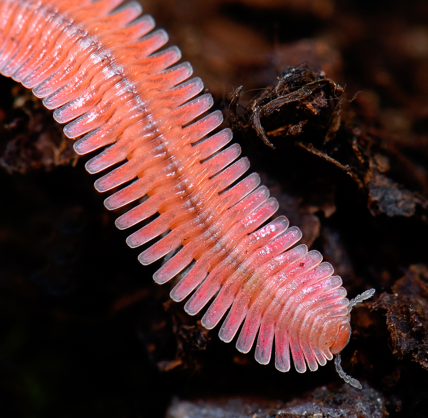 found under logs